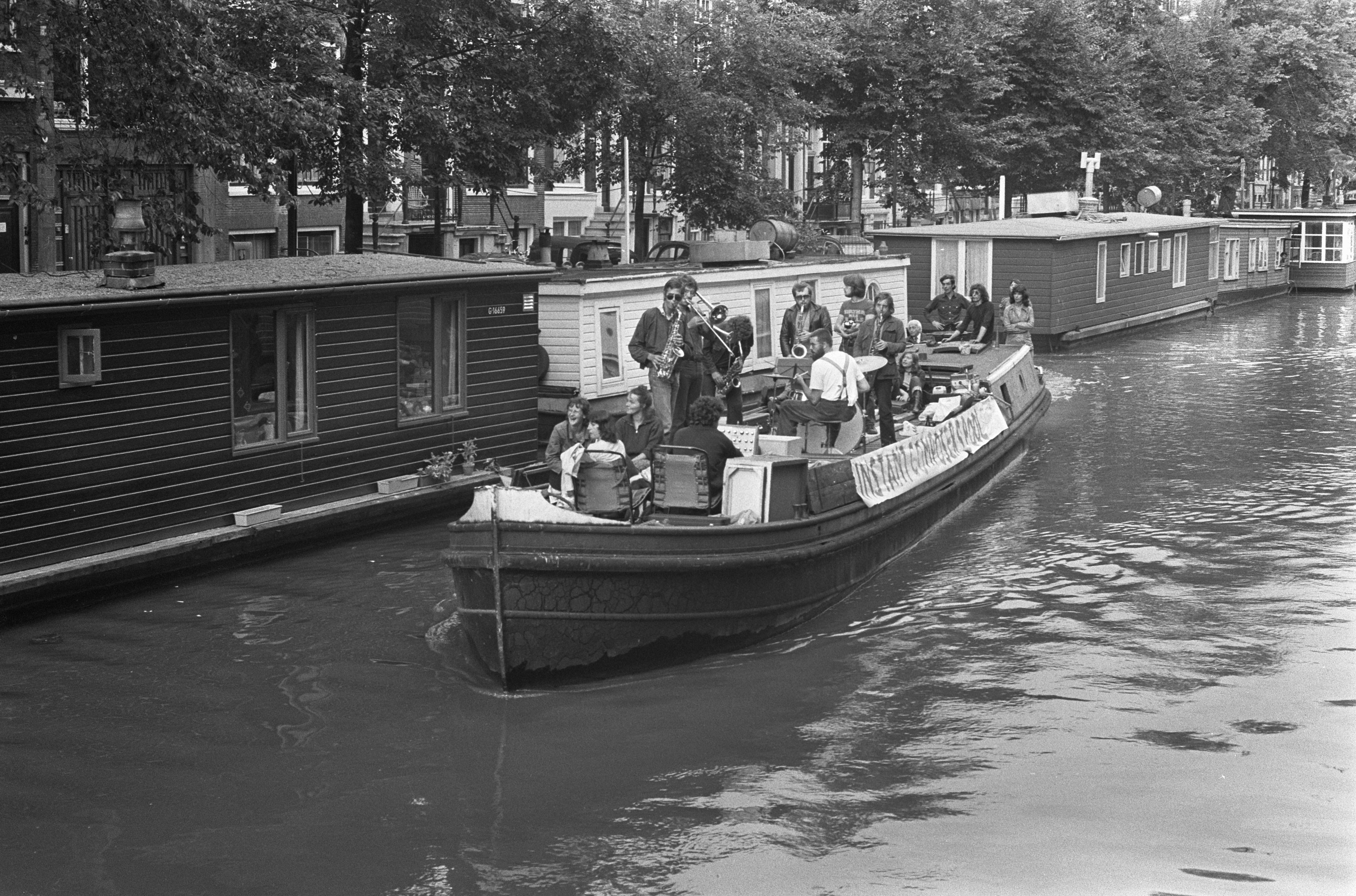 Collectie / Archief : Fotocollectie Anefo Reportage / Serie : [ onbekend ] Beschrijving : Willem Breukers Instant Pool geeft concert op boot in Amsterdamse grachten Datum : 4 augustus 1973 Locatie : Amsterdam, Noord-Holland Trefwoorden : GRACHTEN, boten, concerten Fotograaf : Peters, Hans / Anefo Auteursrechthebbende : Nationaal Archief Materiaalsoort : Negatief (zwart/wit) Nummer archiefinventaris : bekijk toegang 2.24.01.05 Bestanddeelnummer : 926-5901